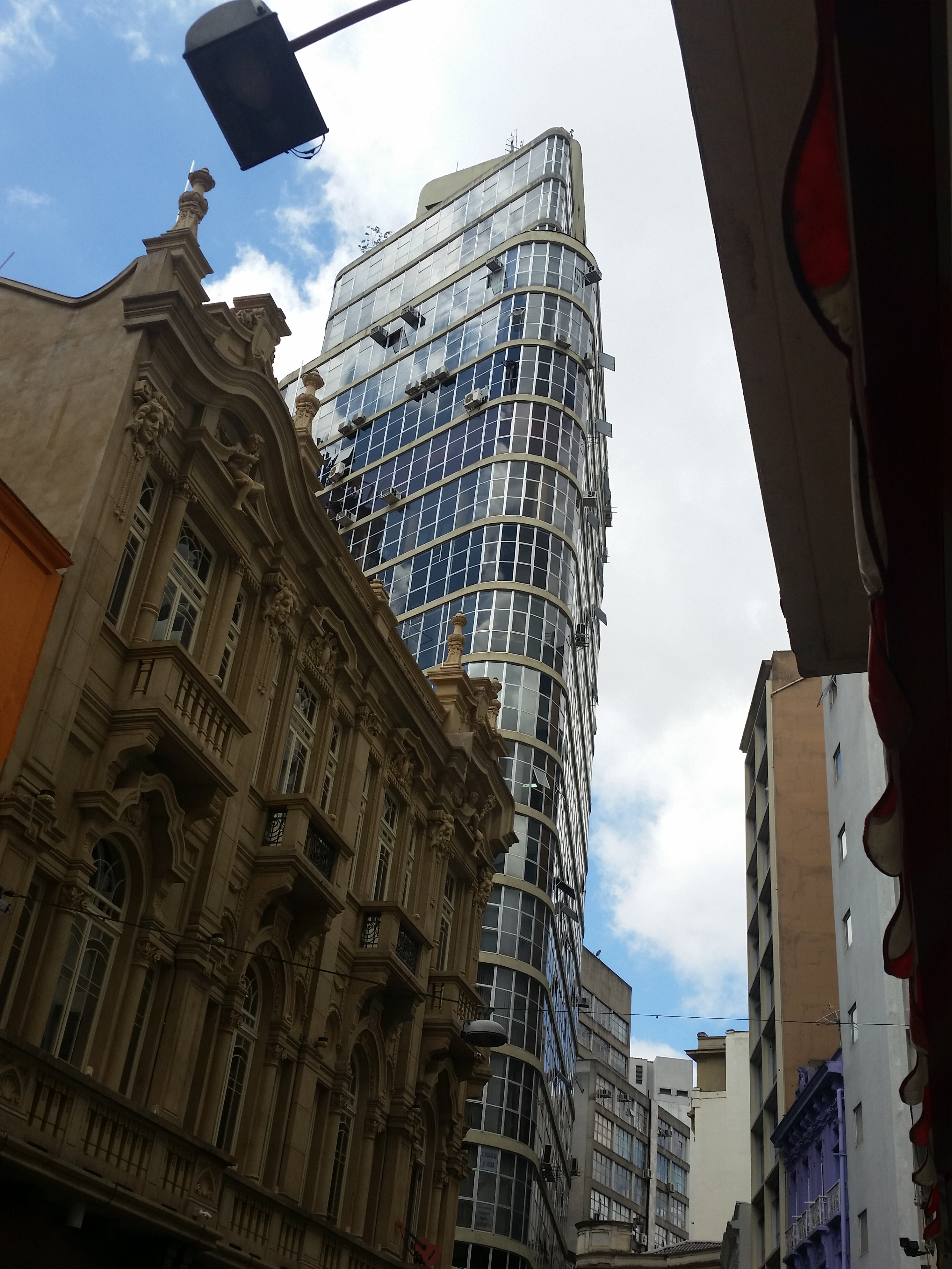 Face oeste, vista da Rua Direita, do Edifício Triângulo, em São Paulo (SP), Brasil